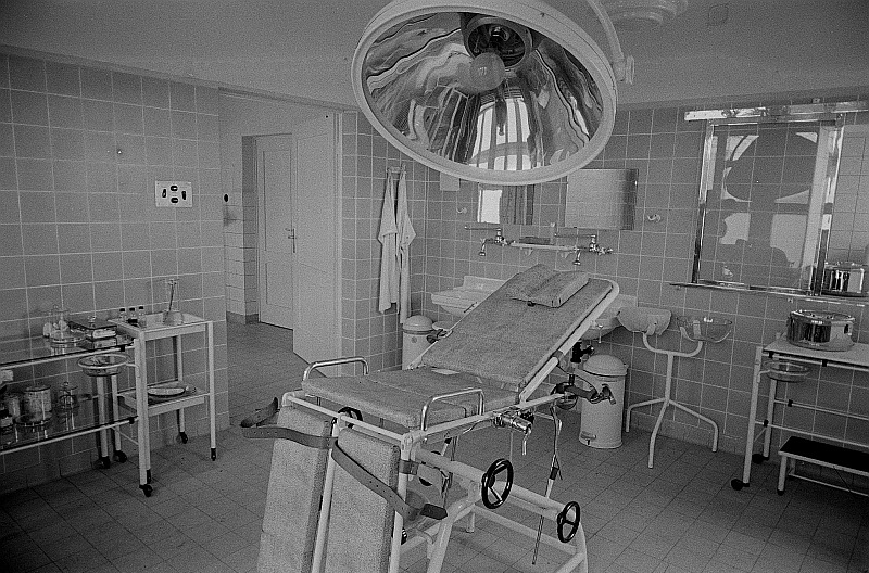 Original image description from the Deutsche FotothekAseptischer Operationssaal in der Poliklinik des VEB Leipziger Eisen- und Stahlwerke